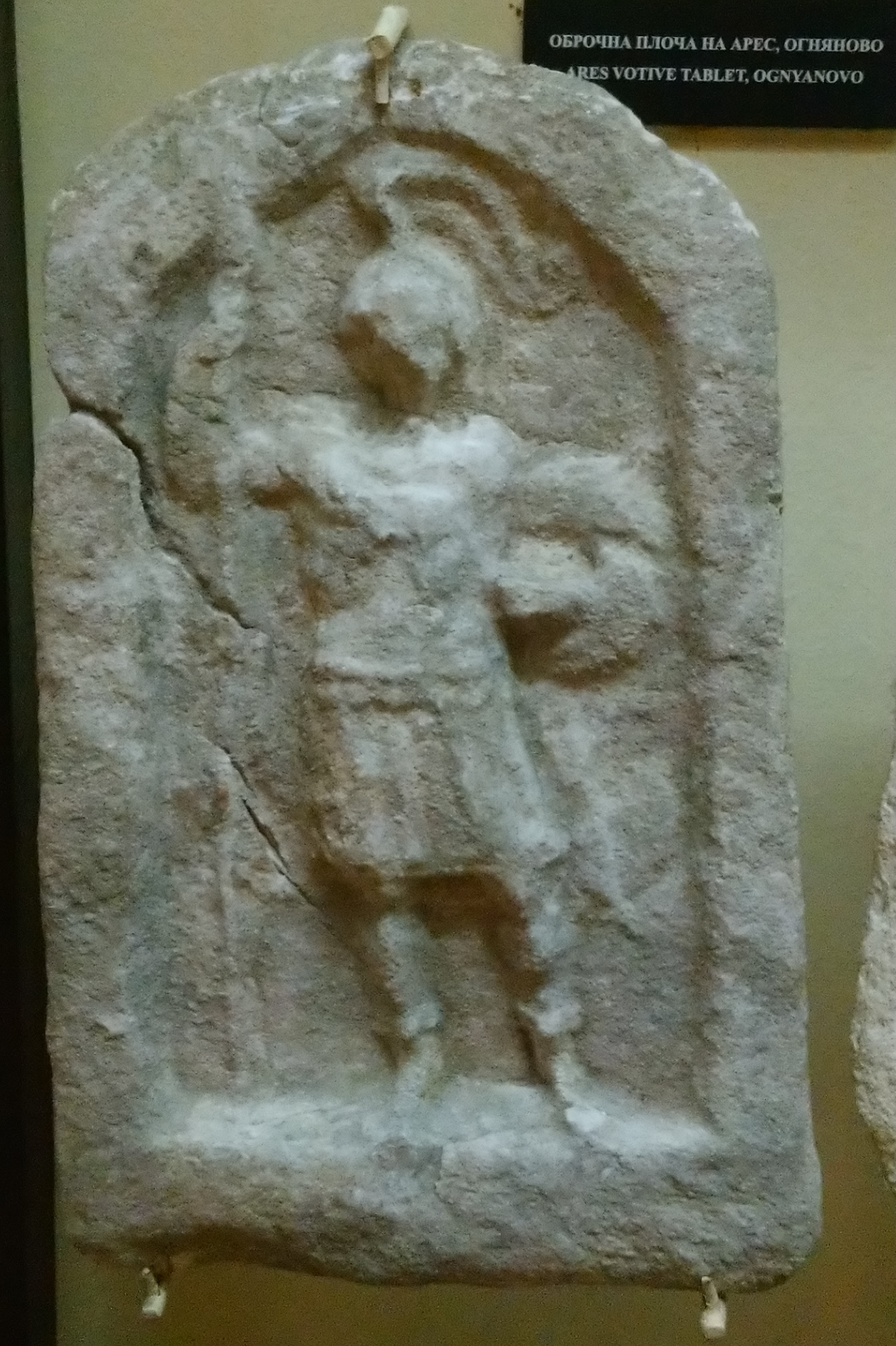 Исторически музей Пазарджик - Оброчна плочка на Арес, Огняново